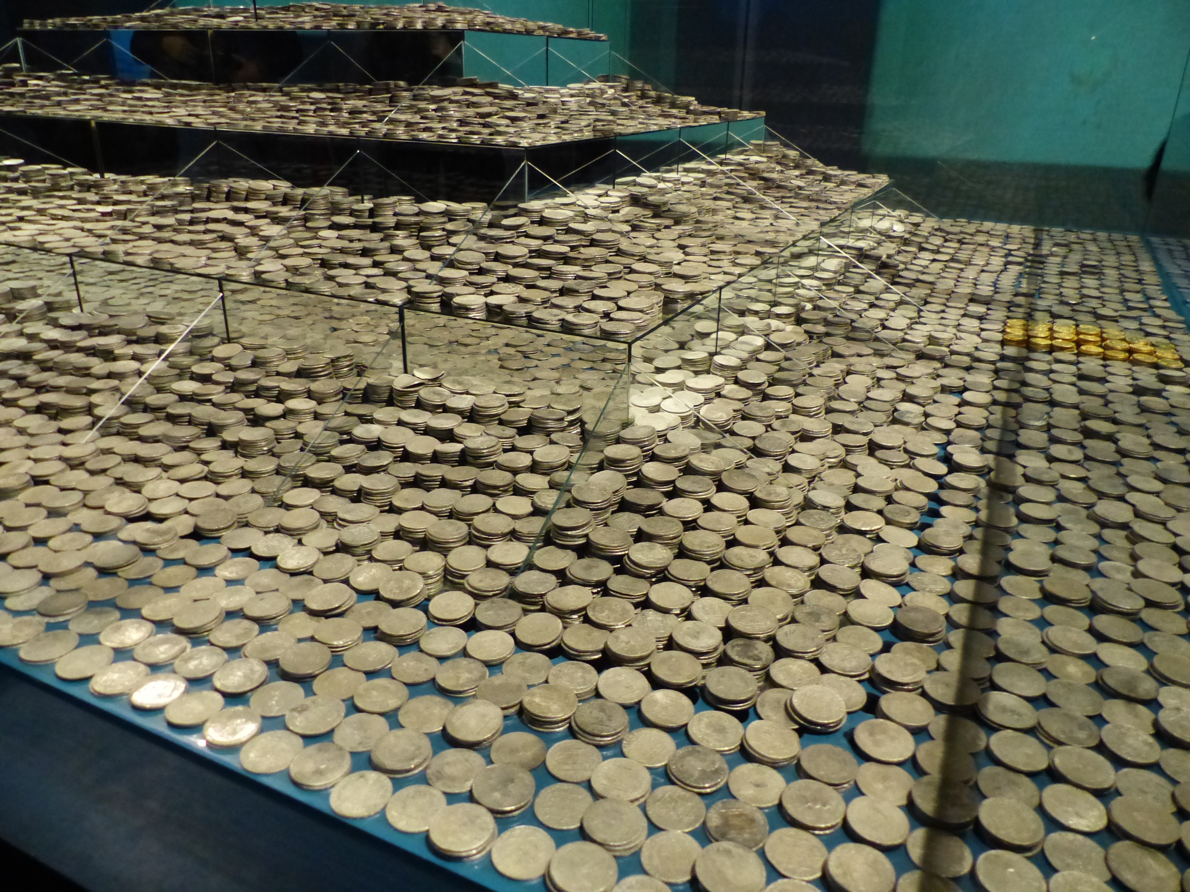 Monedas encontradas en los restos de Nuestra Señora de las Mercedes.